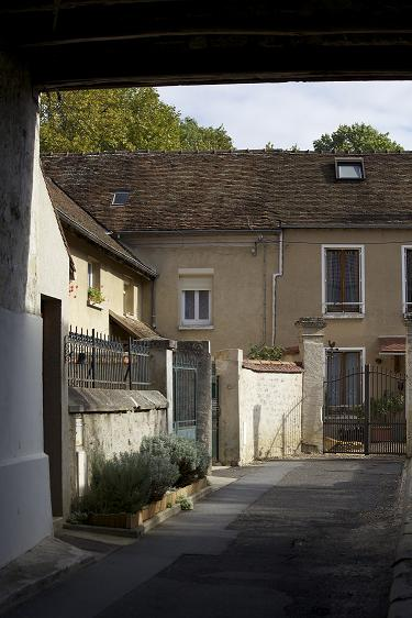 close de vigny petit format